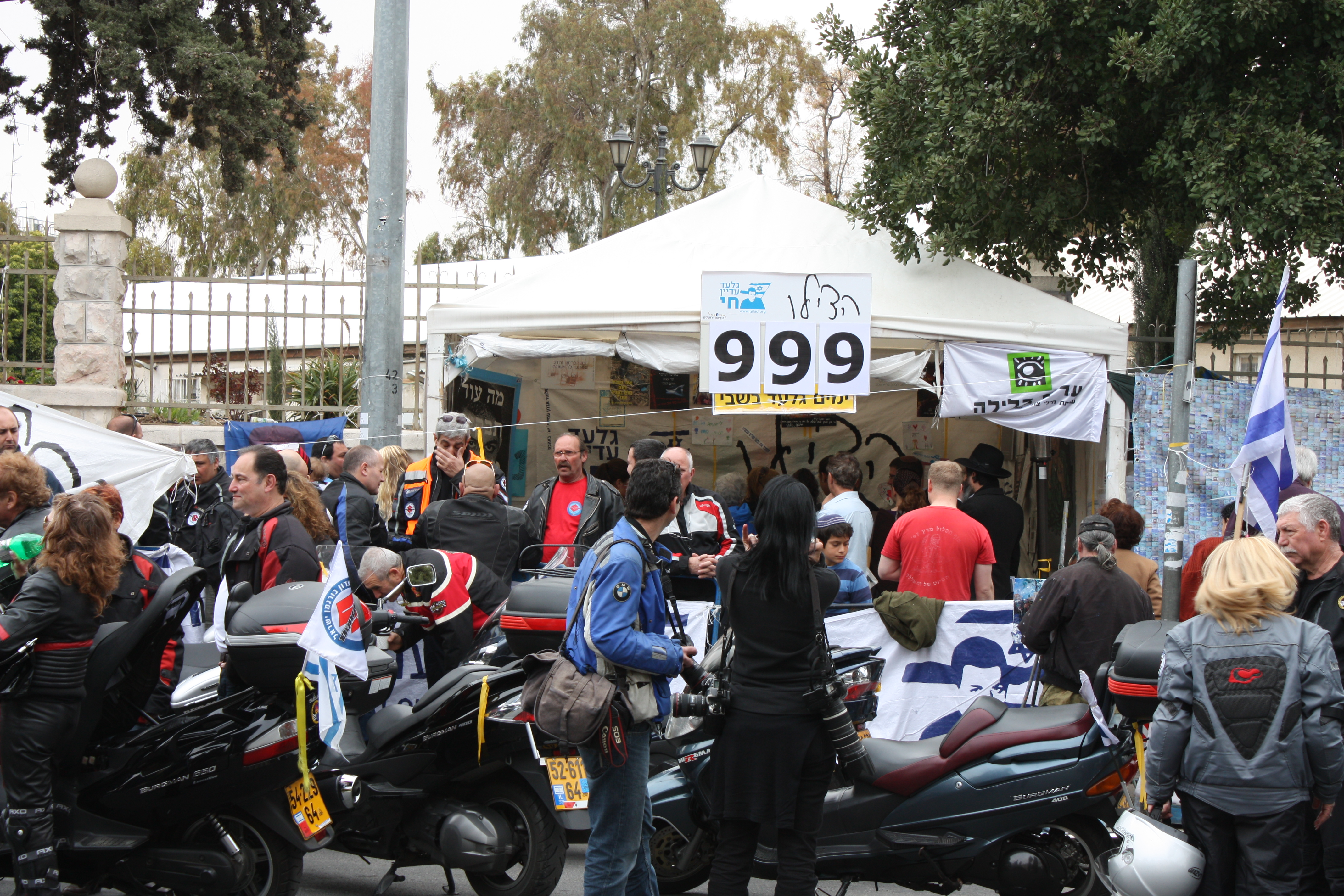 אוהל המחאה של משפט שליט על ידי בית ראש הממשלה